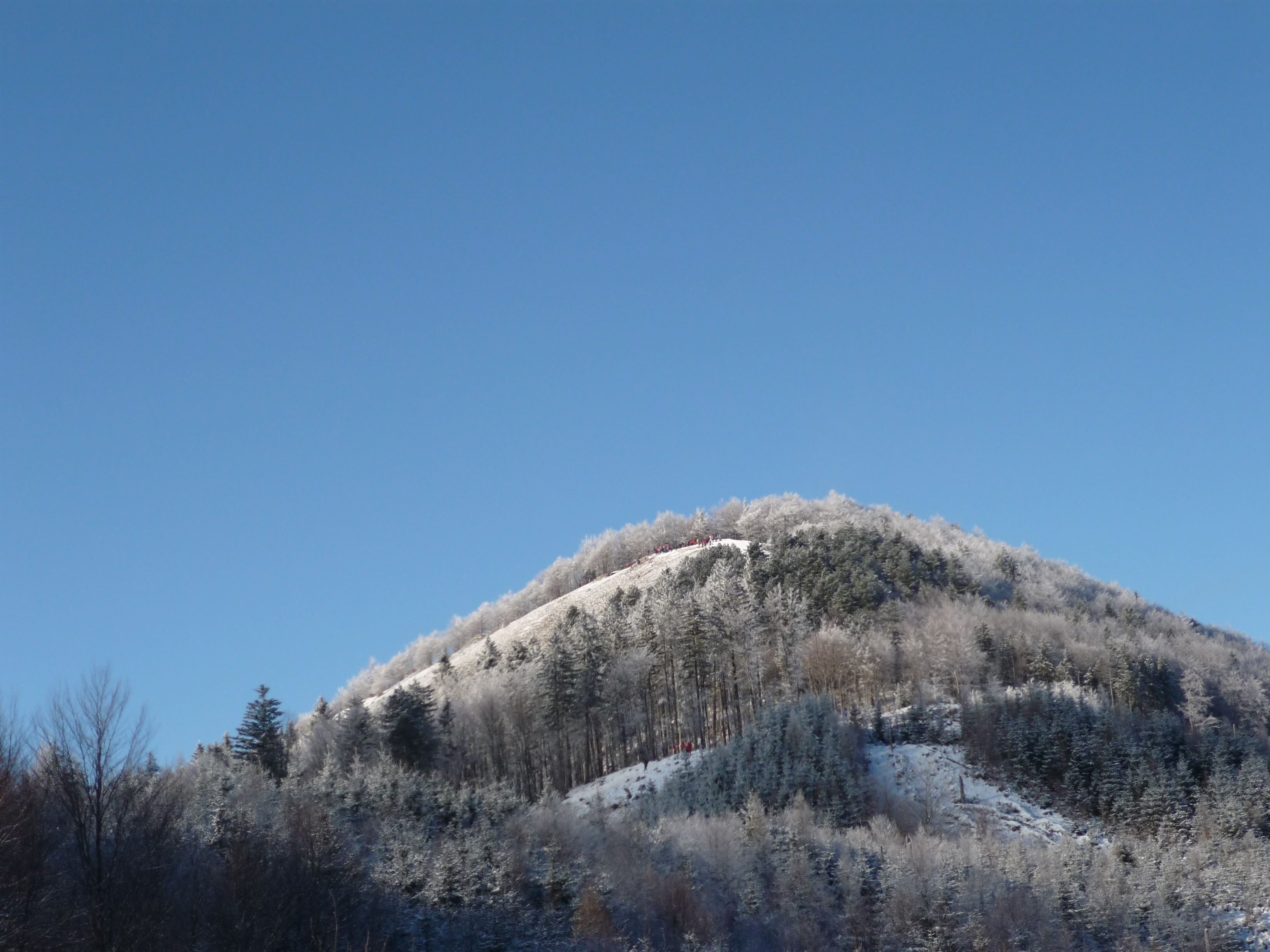 Čipčie nad obcou Turie